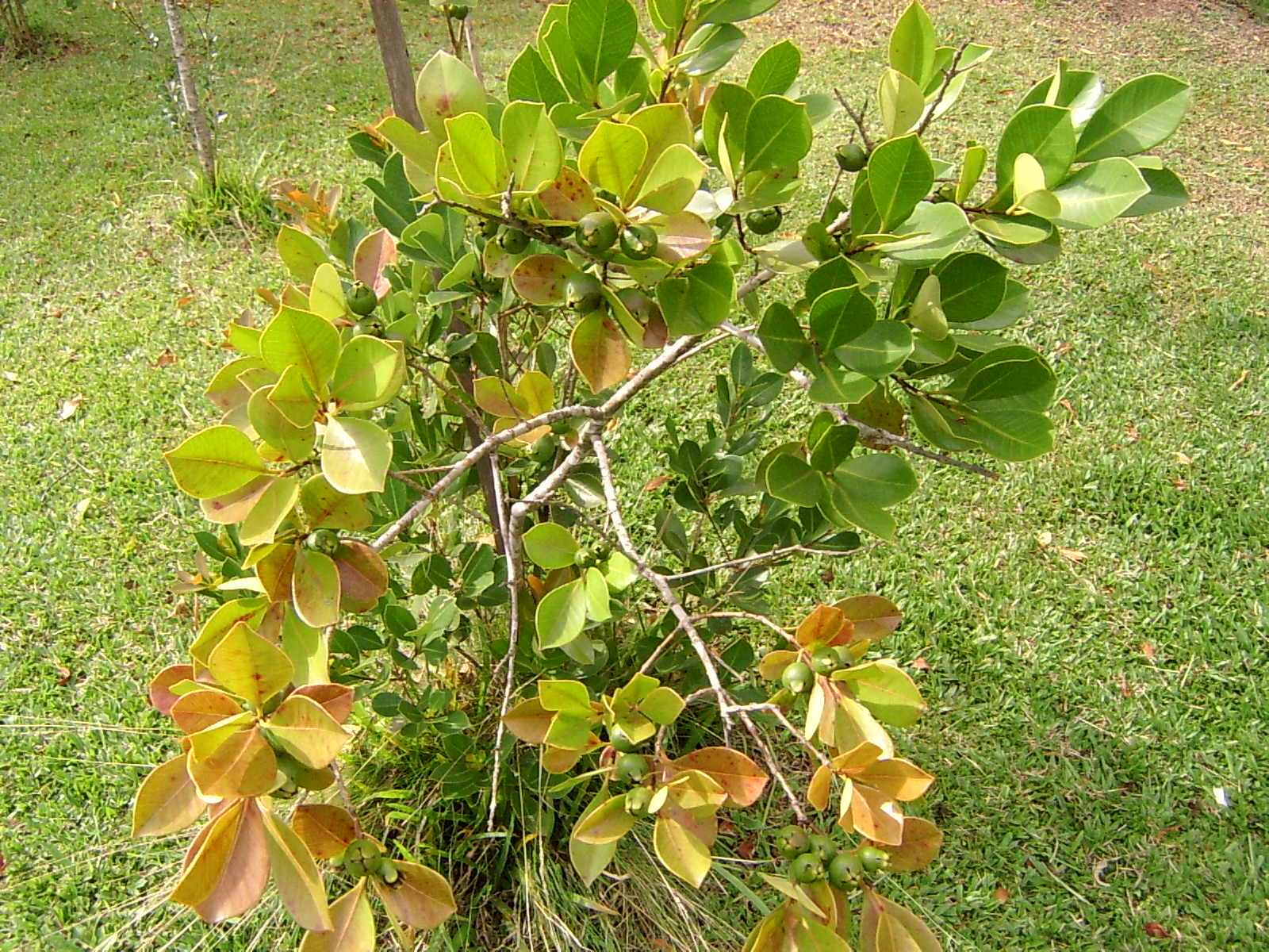 araçá tirado por J.Z.Berger no Paraná, Psidium cattleianum (Myrtaceae, strawbery guava)